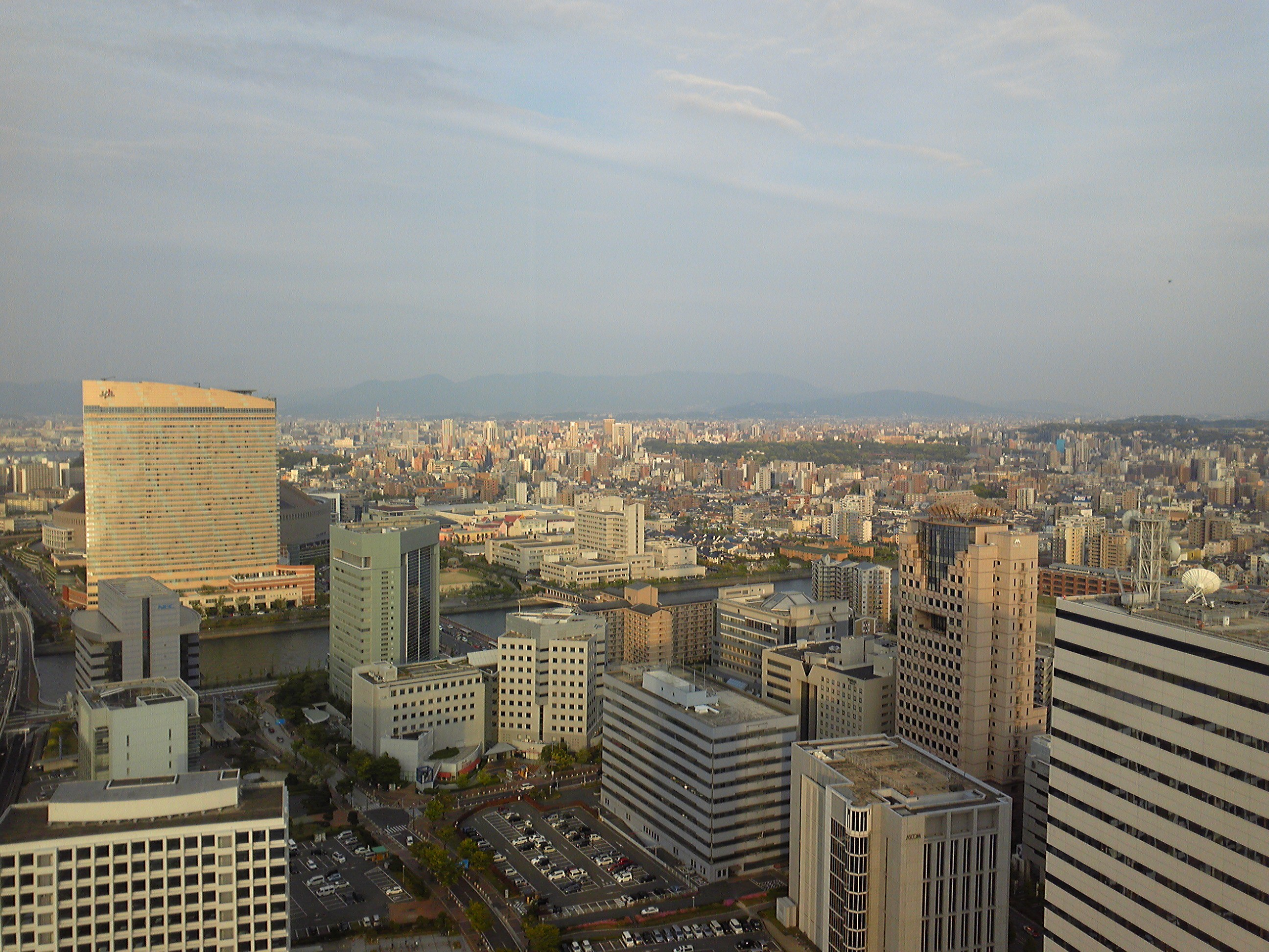 福岡タワーからの福岡市内展望